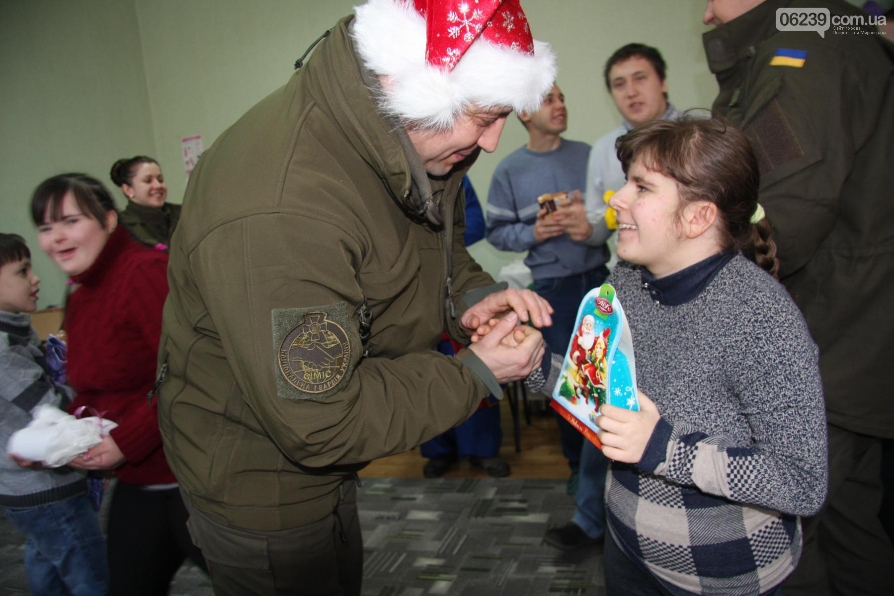 Діяльність CIMIC NGU з доставки гуманітарної допомоги